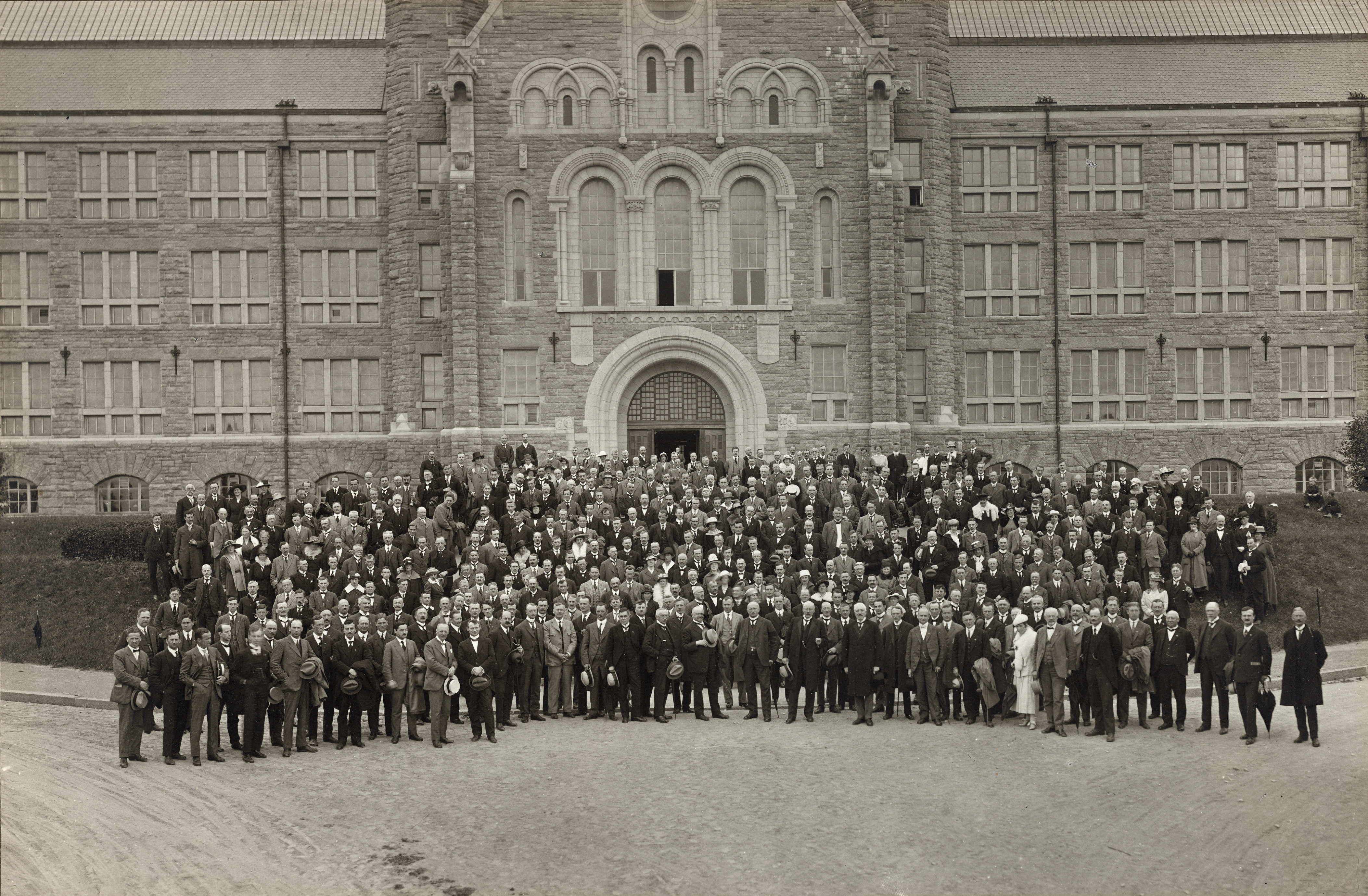 Format: Fotopositiv Dato / Date: ca. 1912? Fotograf / Photographer: Jens Carl Frederik Hilfling-Rasmussen (1869 - 1941) Sted / Place: Trondheim Wikipedia: Norges Tekniske Høgskole Store Norske Leksikon: Kolbjørn Heje (1871 - 1947) Eier / Owner Institution: Trondheim byarkiv, The Municipal Archives of Trondheim Arkivreferanse / Archive reference: Tor.H44.Lxx.F9366 Merknad: Kolbjørn Heje (1871 - 1947) er sentral i bildet. Kolbjørn Heje var professor ved NTH fra 1912 og rektor 1917 - 1920.